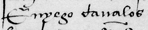 Nom d'Enyego d'Àvalos, gran camarlenc d'Alfons el Magnànim a Nàpols i autor de la novel·la cavalleresca en català "Curial e Güelfa" (document del segle XV)